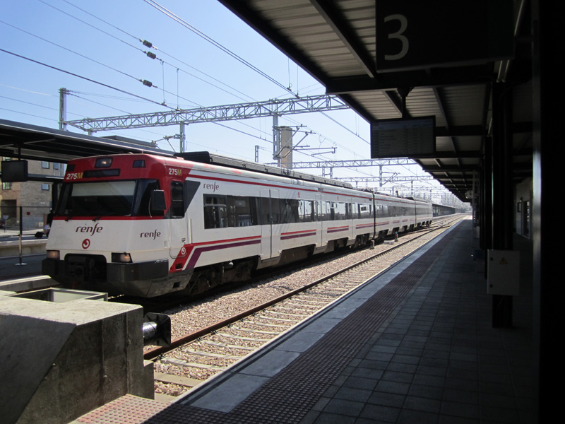 Unidad 447 en la estación provisional de León para el servicio regional León-Gijón